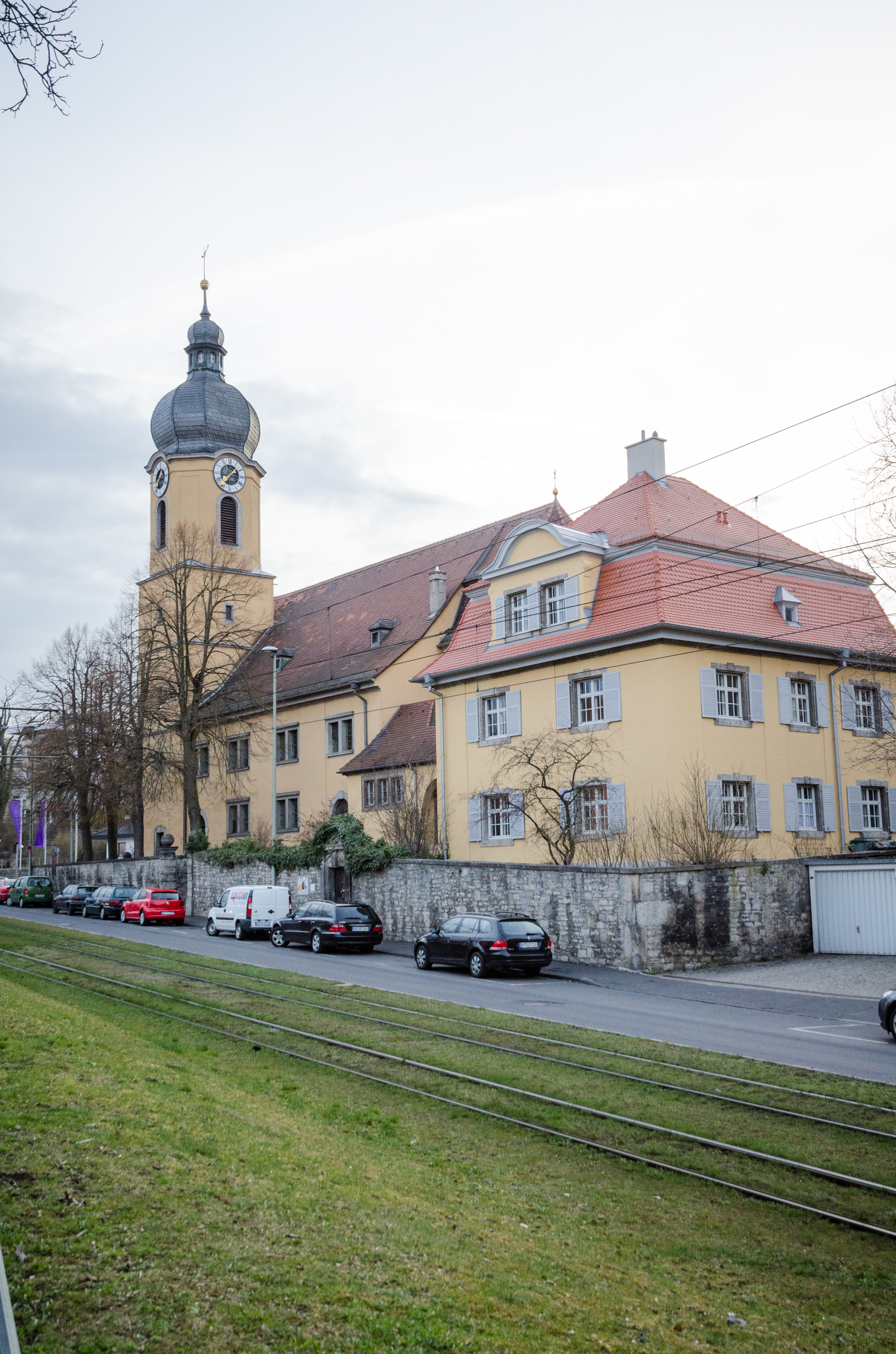 Heidingsfeld, St. Paul